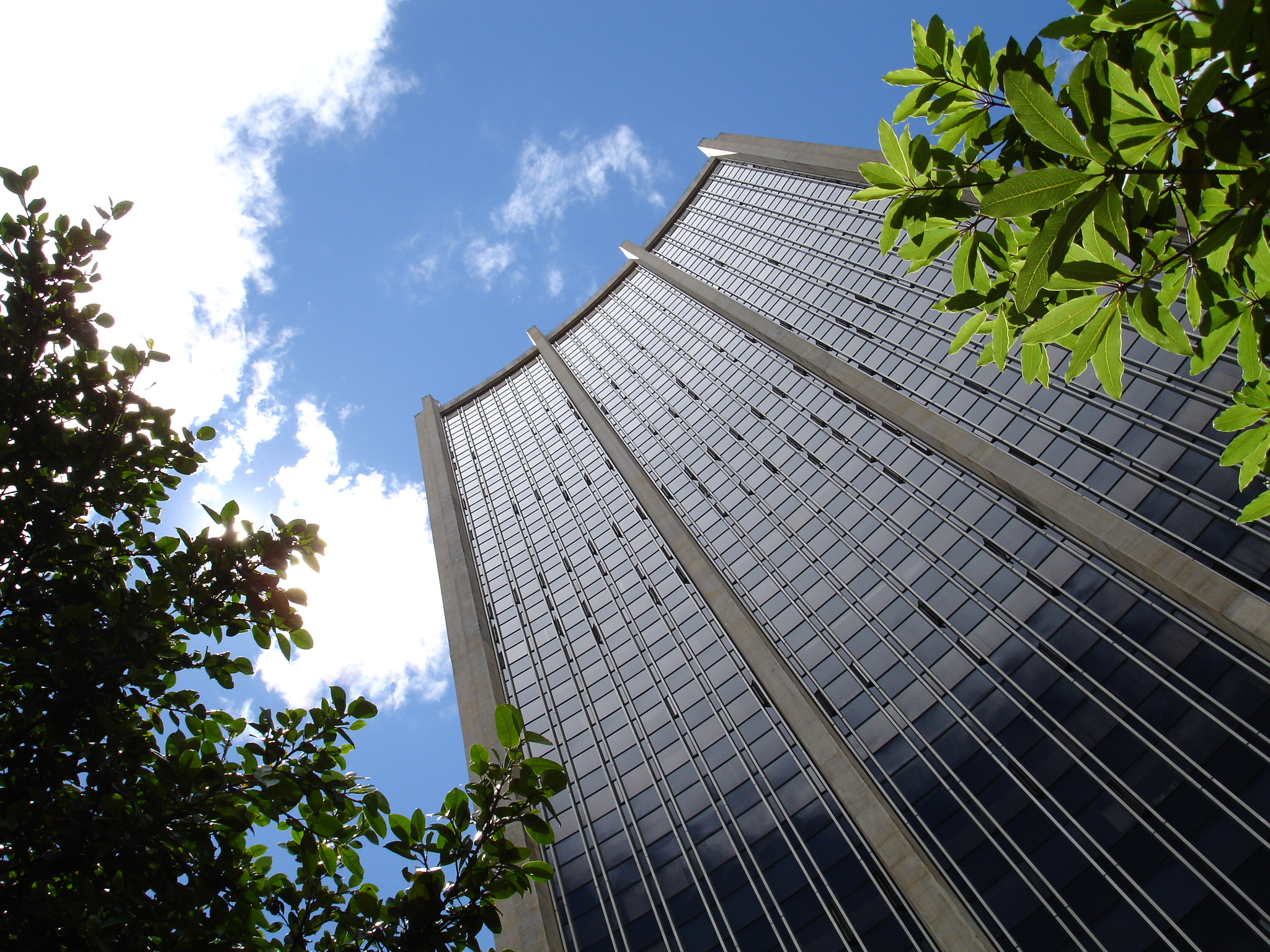 Es una imagen muy bien tomada del edificio seguros tequendama que se encuentra en el centro internacional de Bogotá D. C.